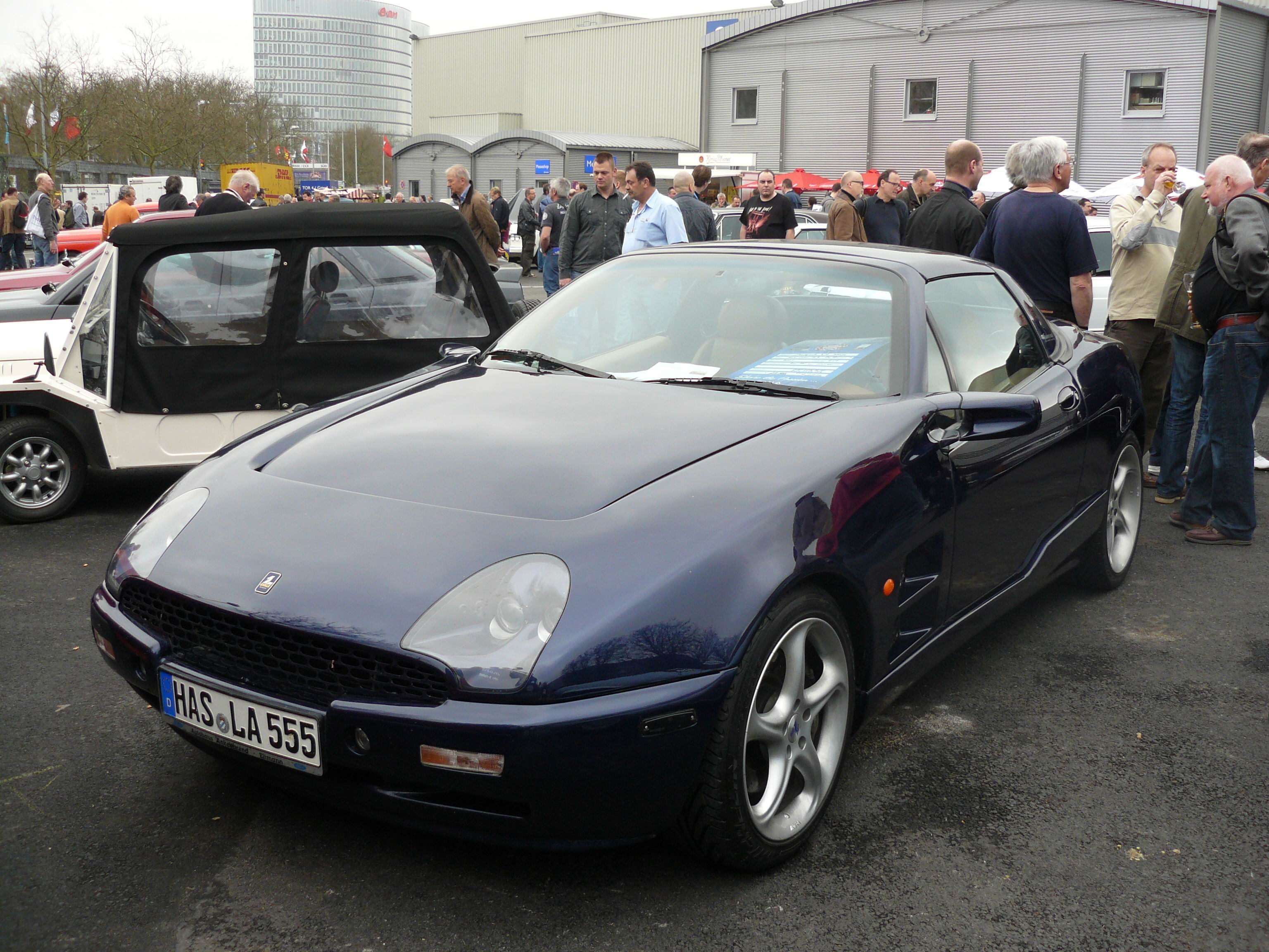 Essen 2011